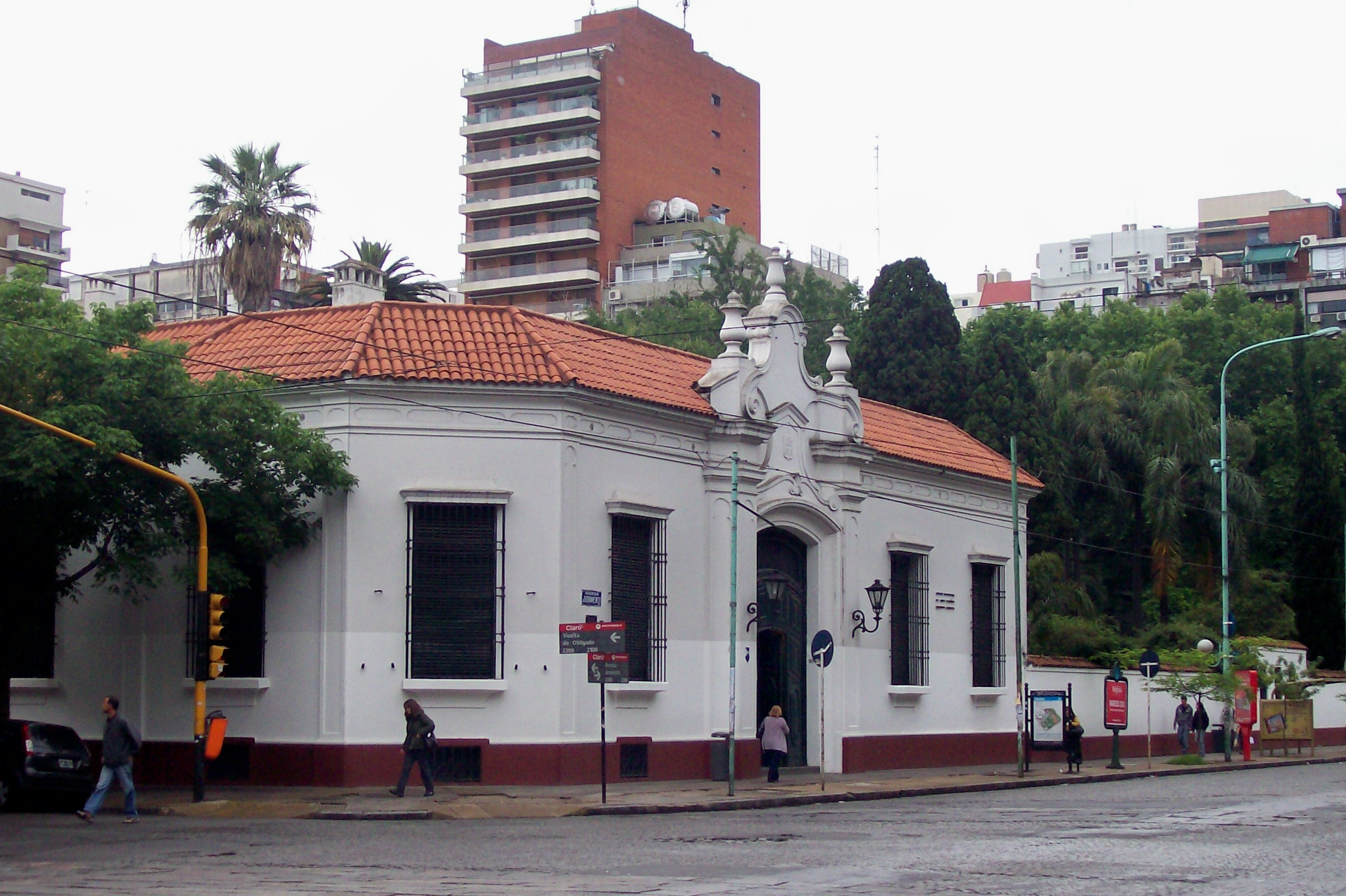 Museo de Arte Español Enrique Larreta, entrada. En Avenida Juramento, barrio de Belgrano, Buenos Aires, Argentina.